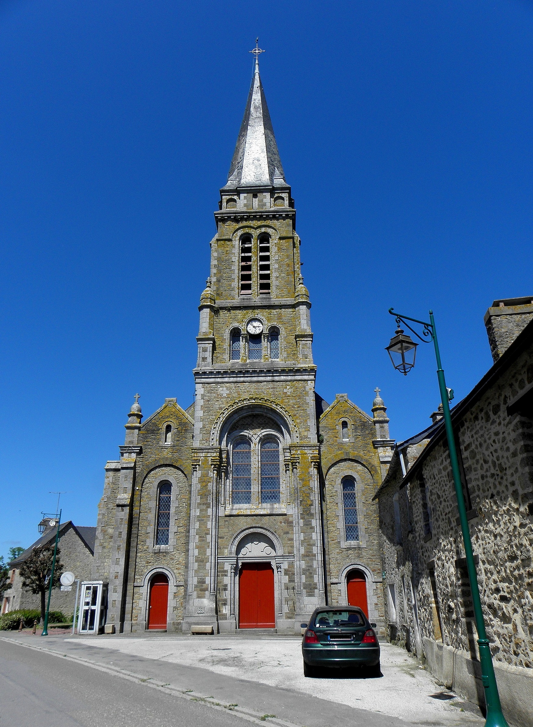 Saint-Germain-d'Anxure (53). Façade principale de l'église.